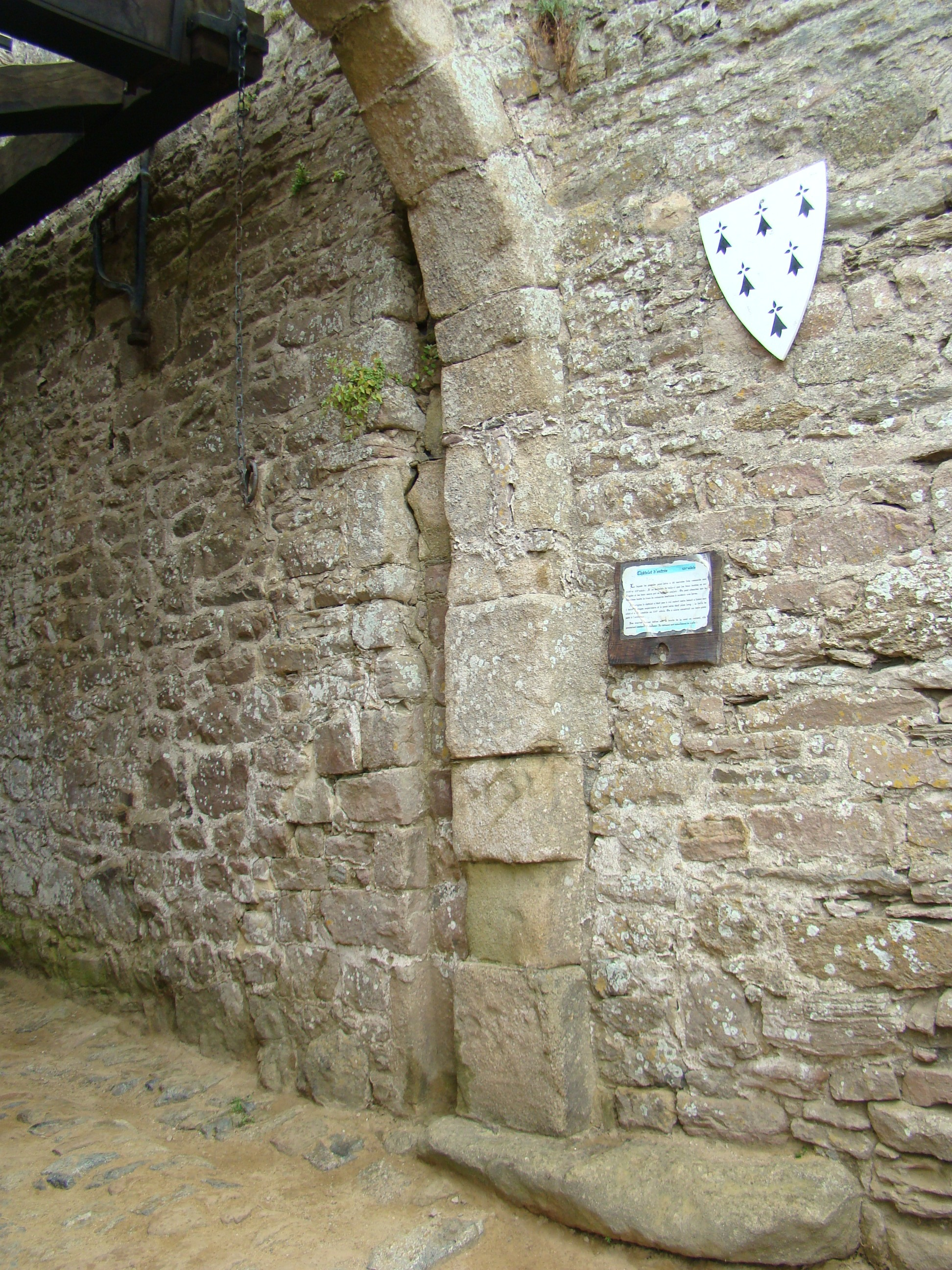 Détail du premier châtelet. On aperçoit la rainure pour laisser passer la herse et la marque des portes de protection supplémentaire (à droite de l'arche, sur la pierre basse et allongée).